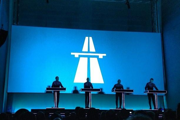 Kraftwerk autobahn via Instagram instagr.am/p/UWuSQzgrEl/